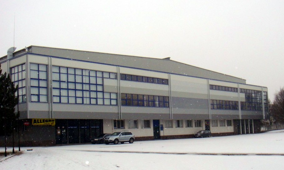 Zimní stadion v Táboře - jižní vchod